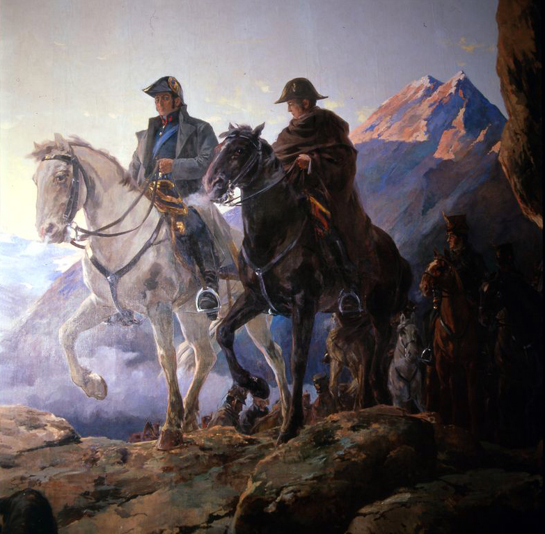 El paso del Ejército Libertador por la cordillera de los Andes. Museo Histórico y Militar de Chile.